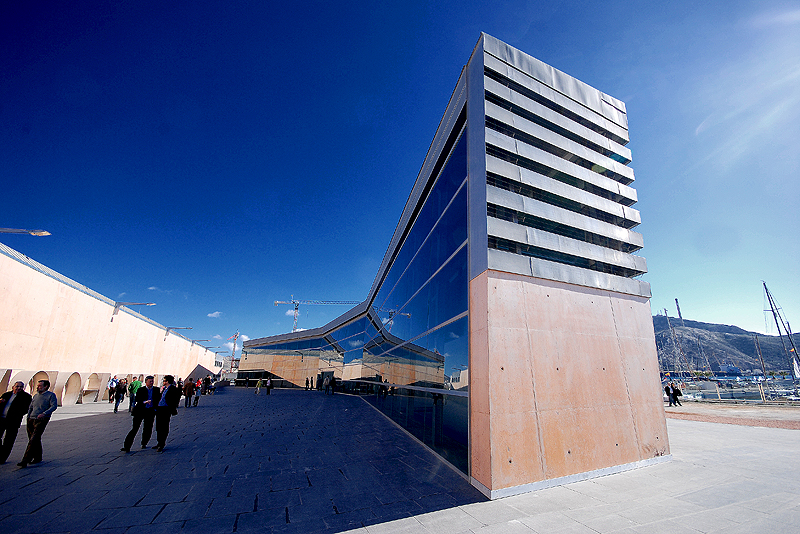 ARQUA. Museo Nacional de Arqueología Subacuática de Cartagena (España).